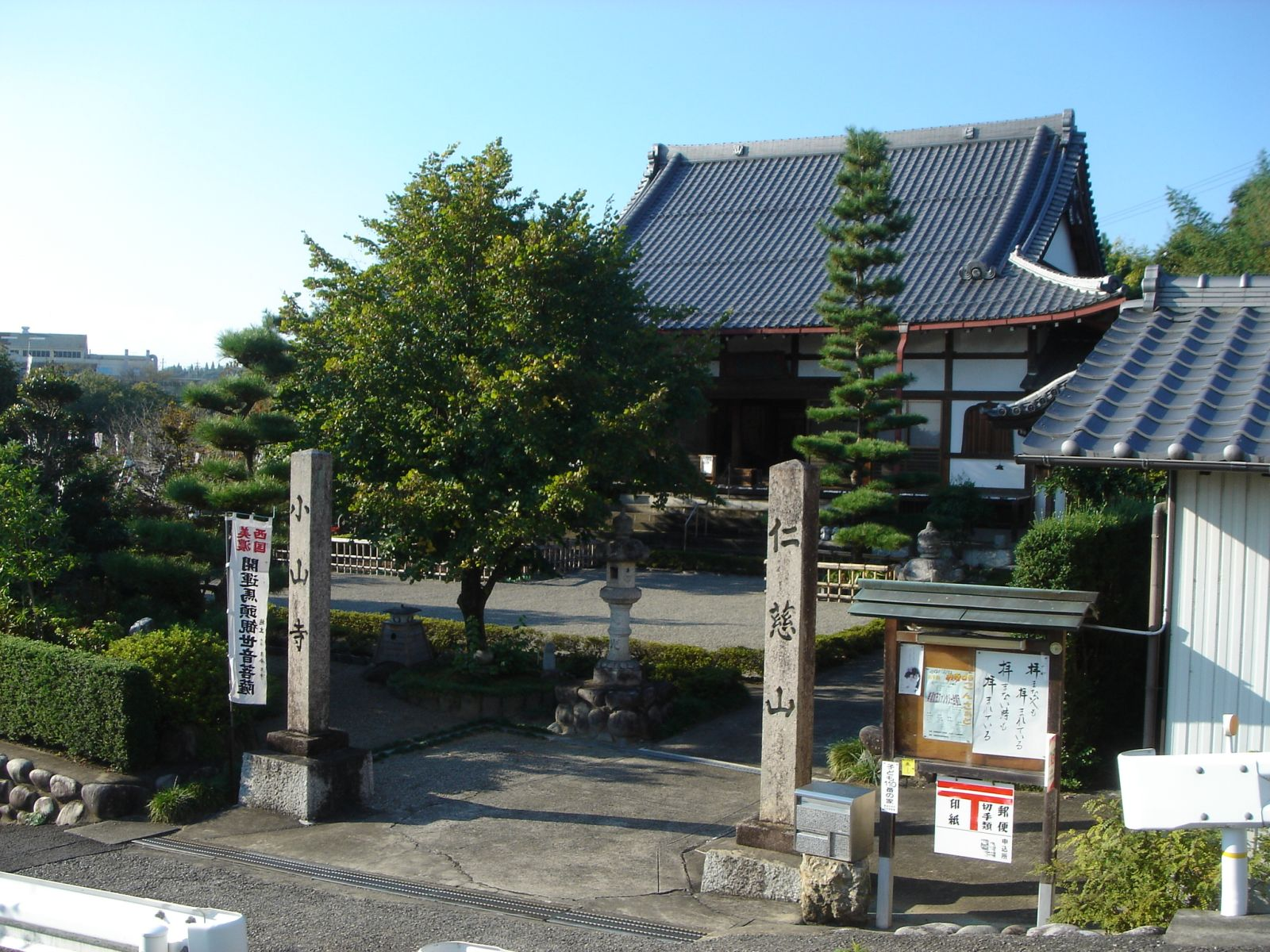 Shozanji(Temple) in Minokamo(小山寺),Minokamo,Gifu,Japan(岐阜県美濃加茂市)で撮影。